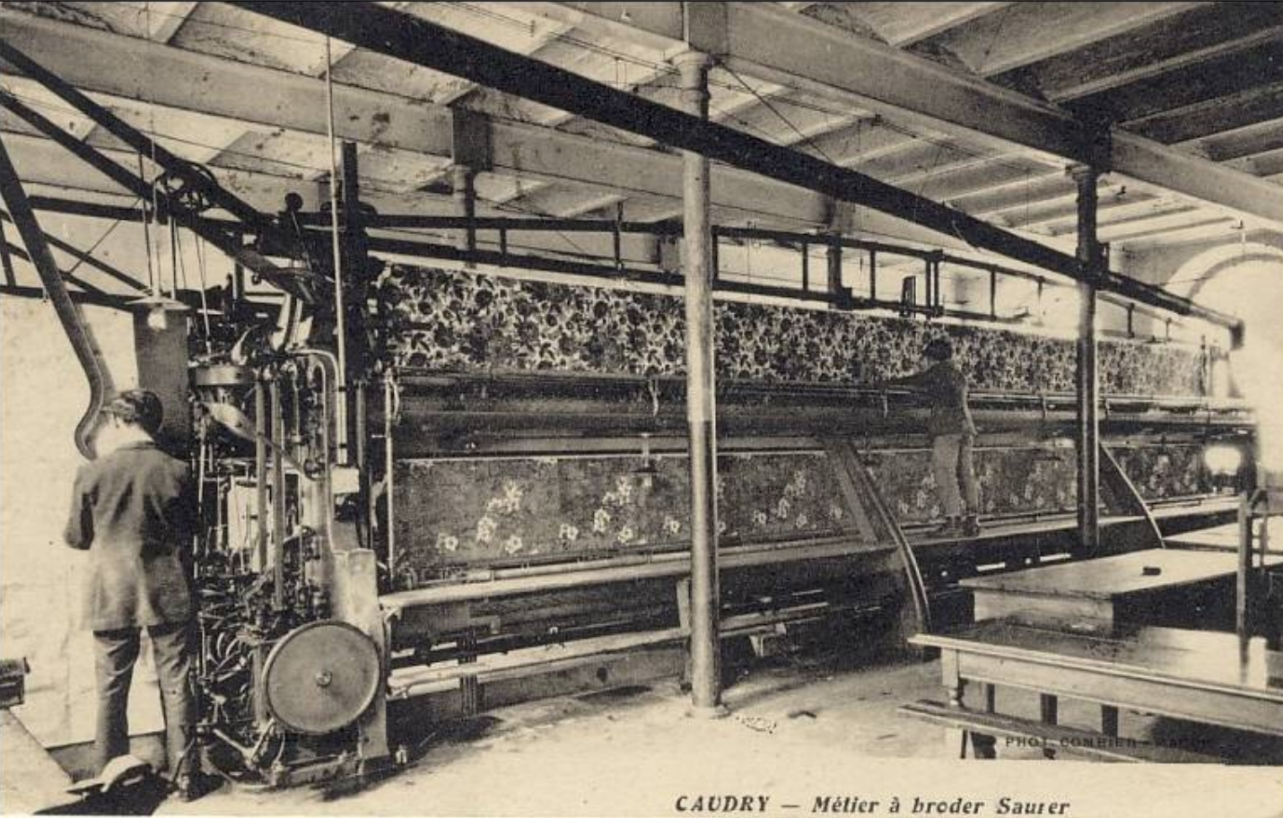 Métier à broder Saurer, Caudry, Nord, Nord-Pas-de-Calais, France